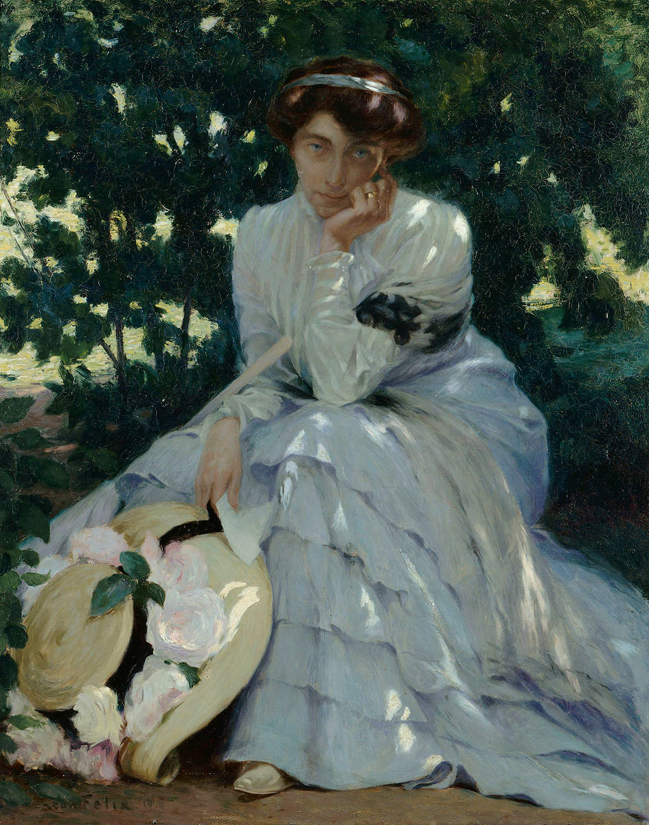 Mélancolie